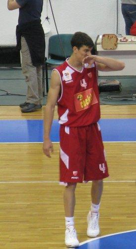 Marko Kešelj